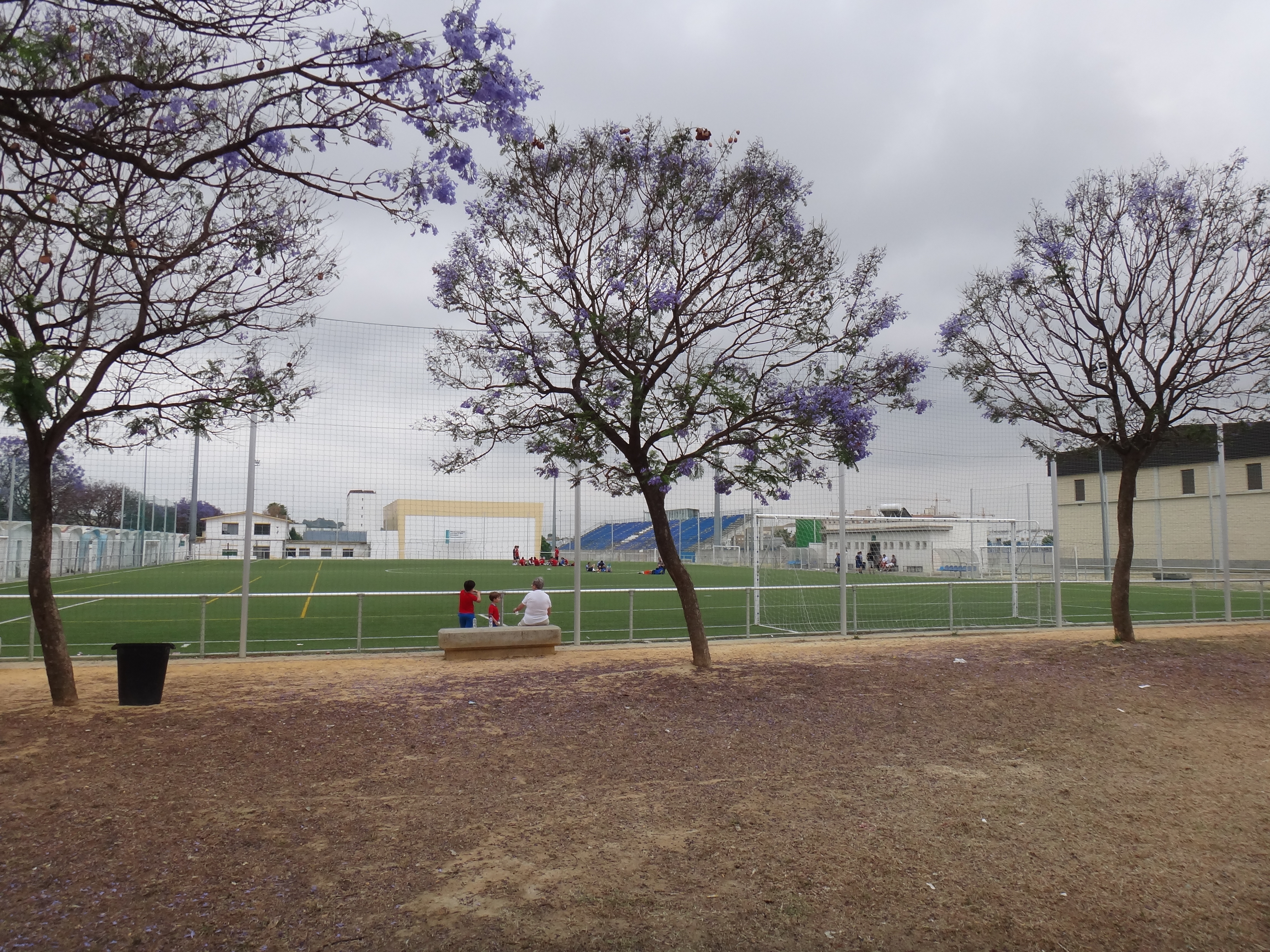 Entrada al Campo de la Juventud en Jerez Fra (Andalucía, España)